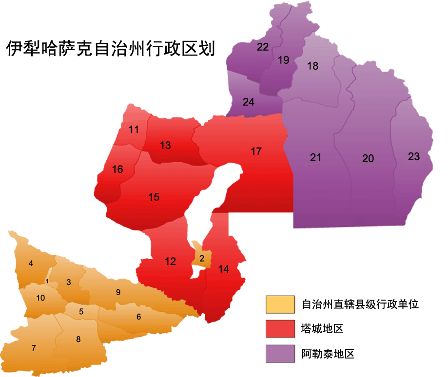 aieru